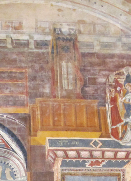 Fonte